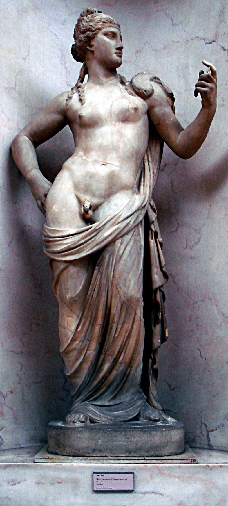 Statuia lui Bacchus în Muzeul Luvru din Paris